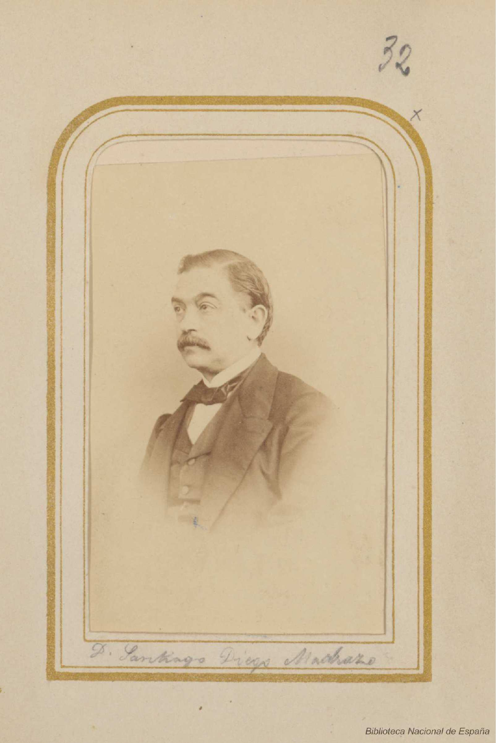 Retrato de Santiago Diego Madrazo, fotografía en papel albúmina de J. Laurent. Álbum de retratos de la colección Hartzenbusch. Biblioteca Nacional de España.